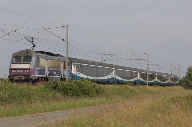 L'Interloire du samedi soir tiré par la BB26002 en livrée "en voyage" à La Bohalle